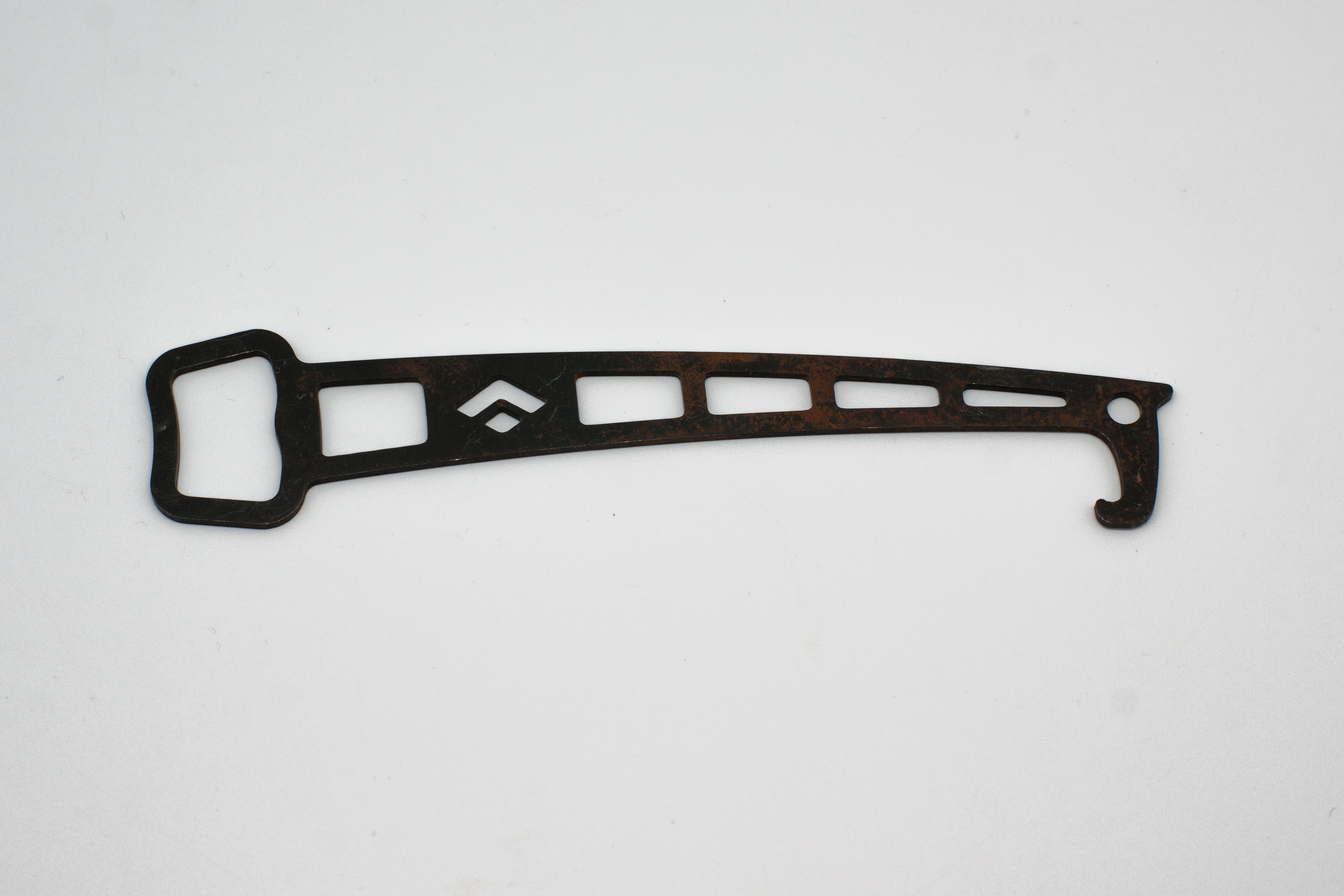 Matériel d'escalade - studio WMCH - décoinceur